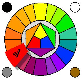 kolorcirklo (mem farita de la vikipediistino bab en 2004) kun markigo RUĜA koloro